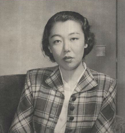 アサヒグラフ 昭和25年4月19日号表紙